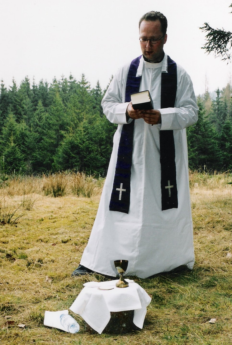 Vojtěch Eliáš slouží polní mši